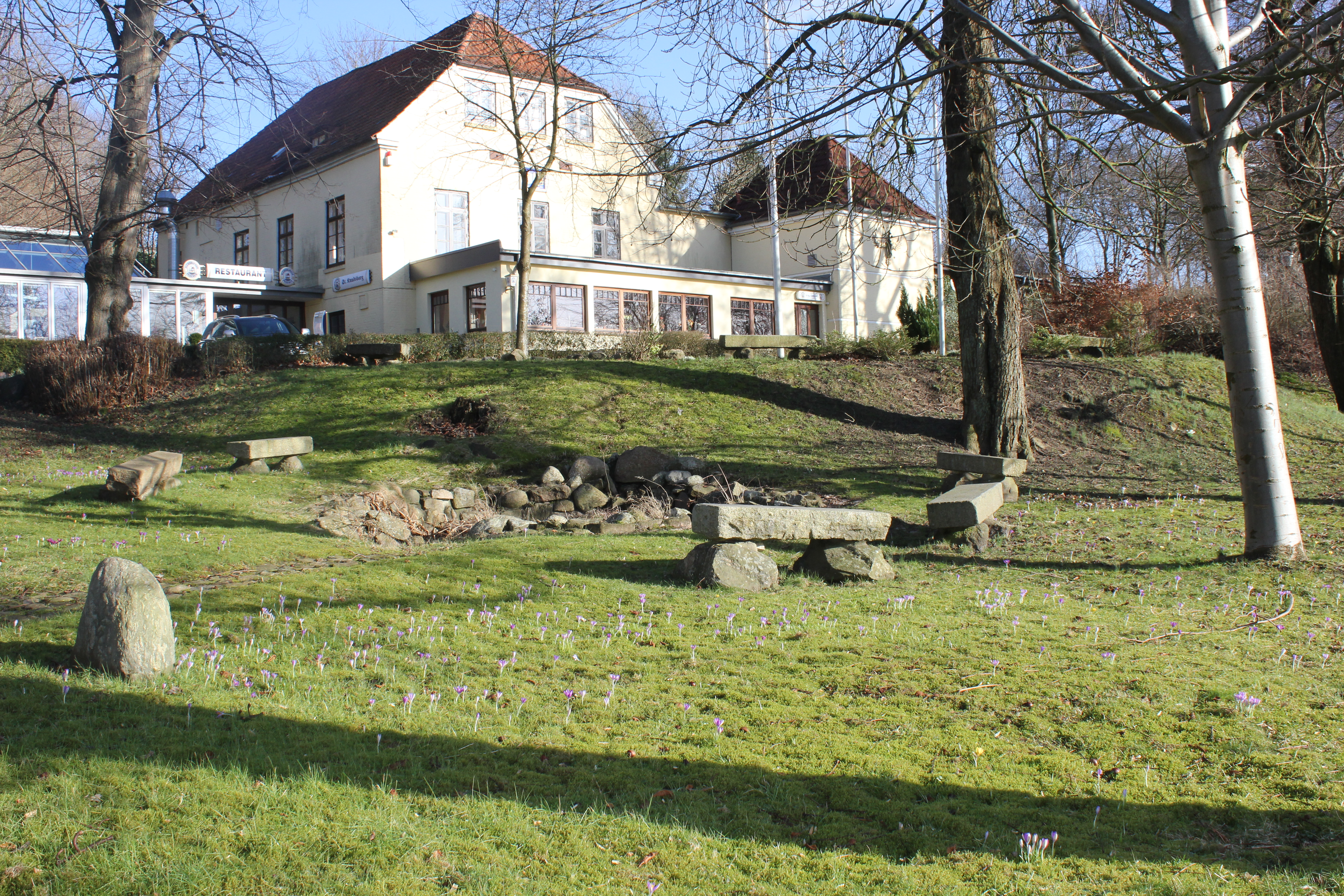 Gartenbereich mit Blick auf St. Knudsborg, Bild 02